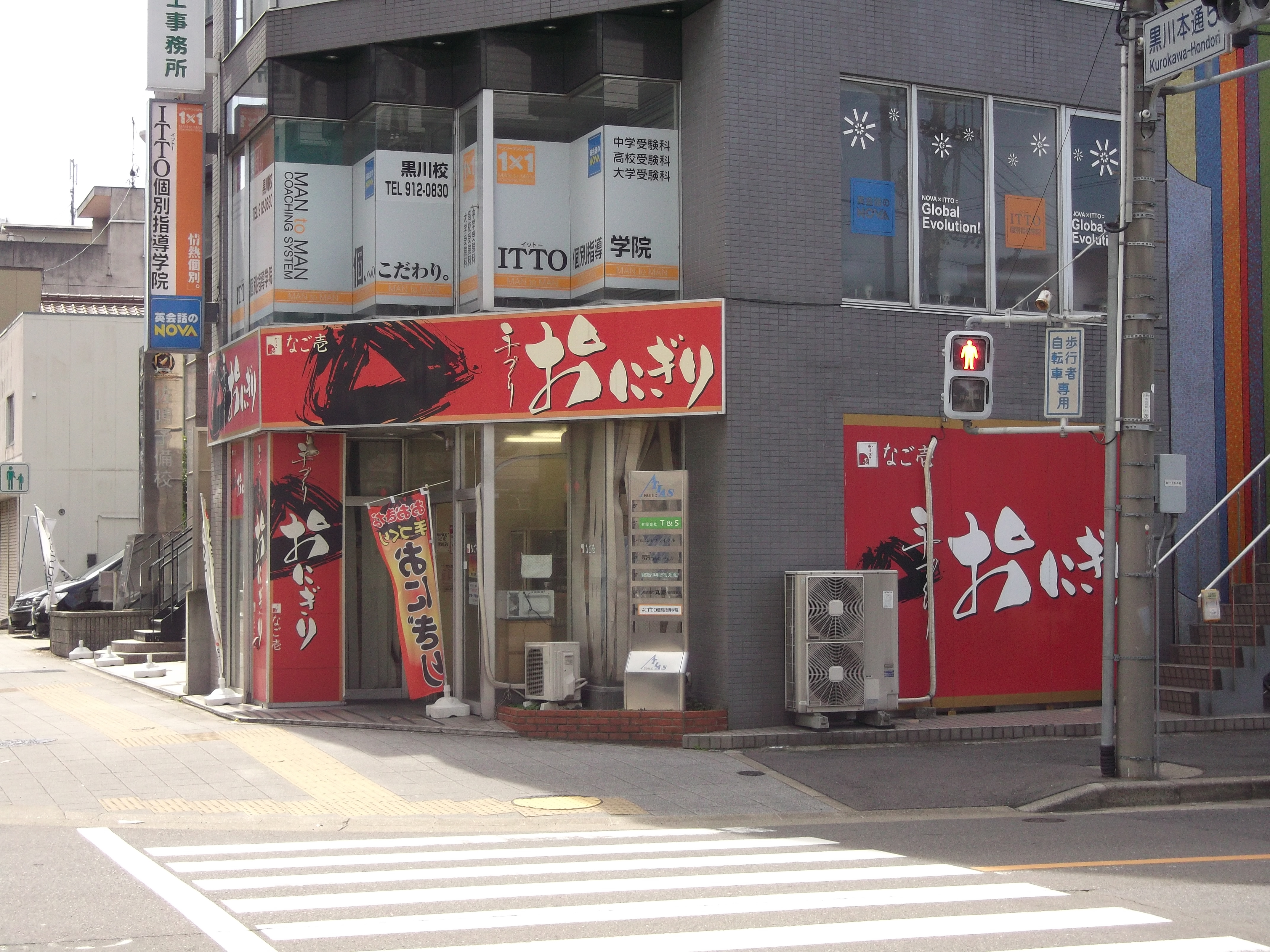 名古屋市北区黒川本通のなご壱名古屋本店を北側公道より撮影